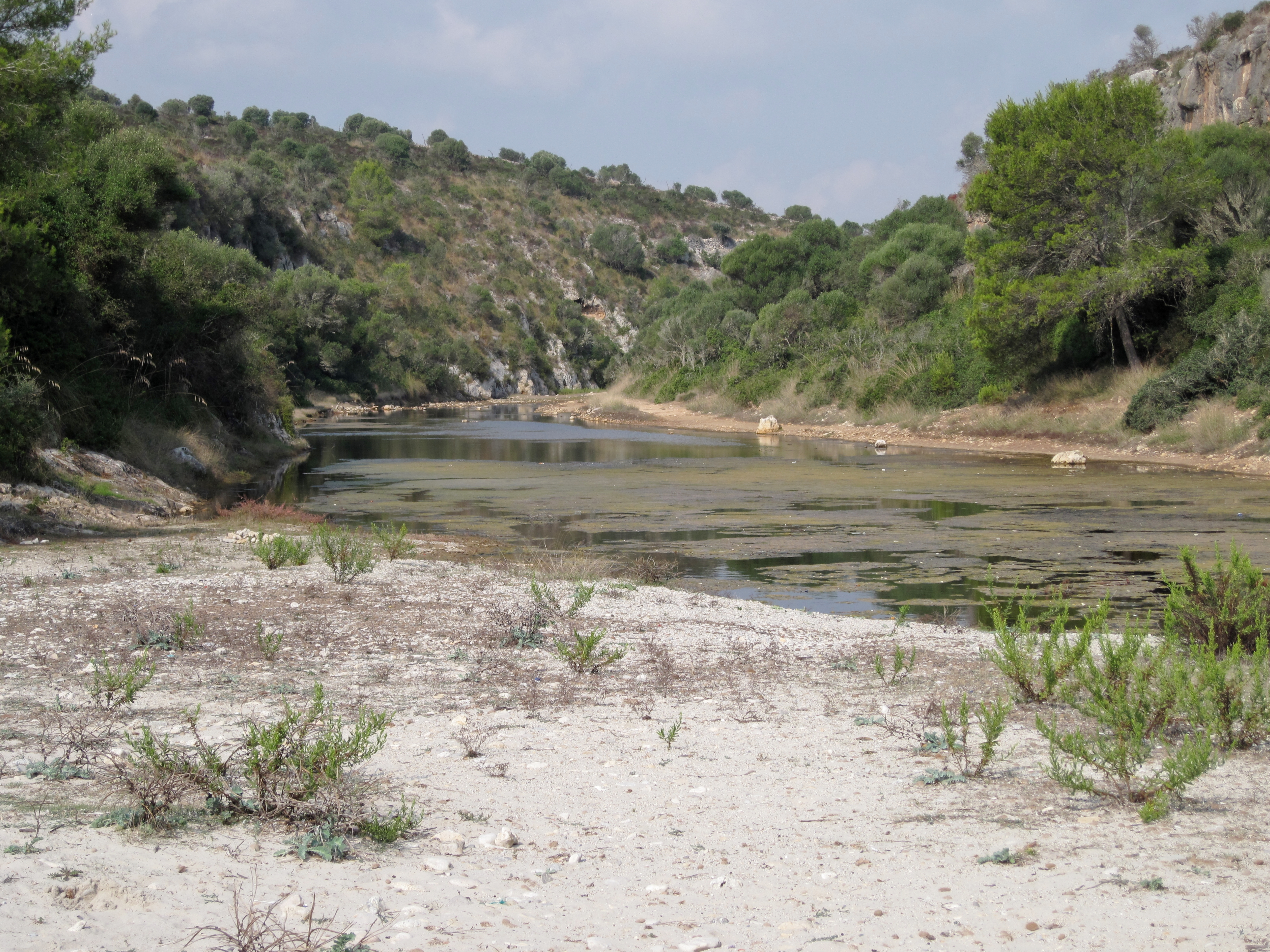 Reguero de Cala Magraner, Sturzbach (Torrent; Reguero: wörtl. übersetzt „Rinnsal“) zur Cala Magraner, einer Bucht an der Küste der Gemeinde Manacor, Mallorca, Spanien